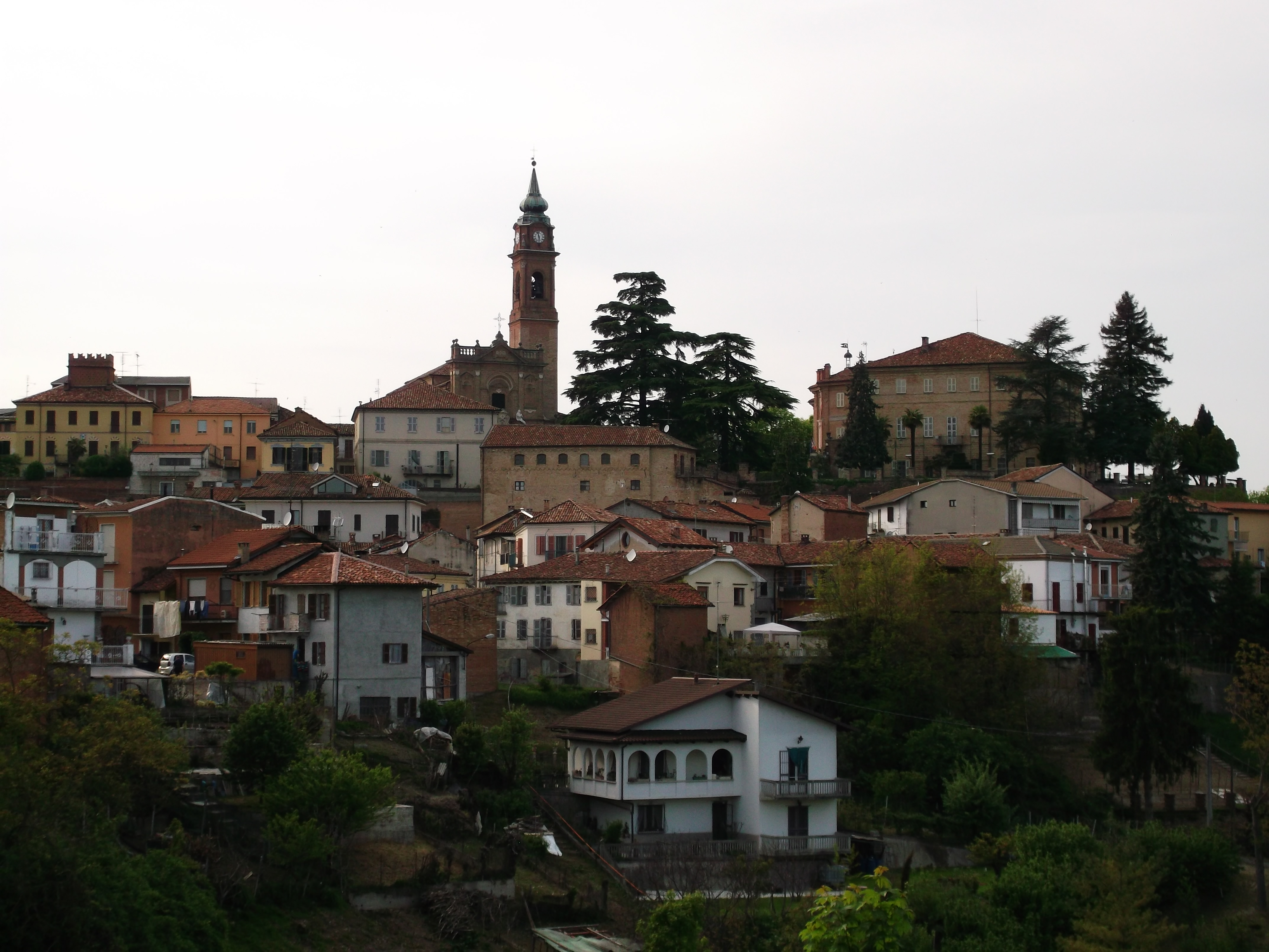 Comune di Castell'Alfero, provincia di Asti